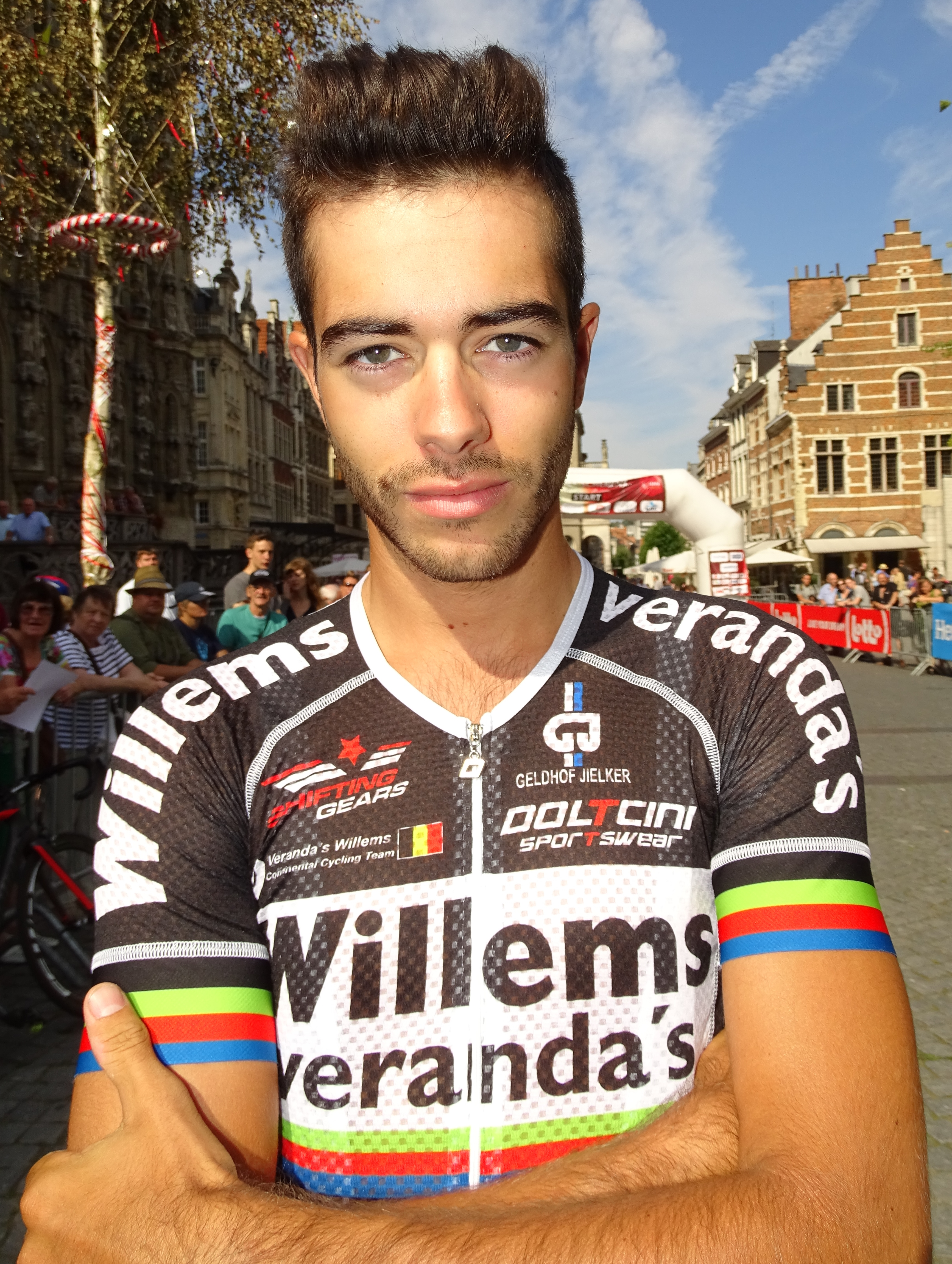 Reportage réalisé le dimanche 23 août à l'occasion du départ et de l'arrivée du Grand Prix Jef Scherens 2015 à Louvain, Belgique.